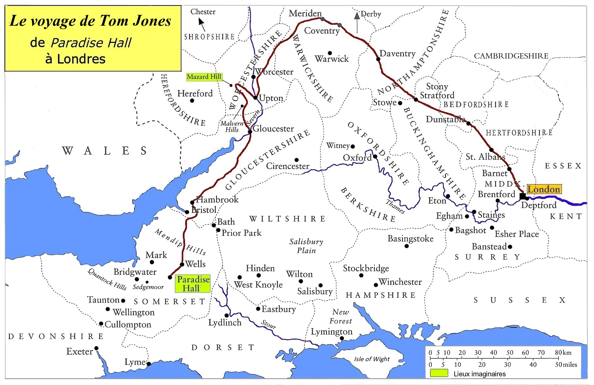 Carte visualisant le voyage de Tom Jones (et celui de Sophia Western) depuis Paradise Hall, dans le Somerset, jusqu'à Londres